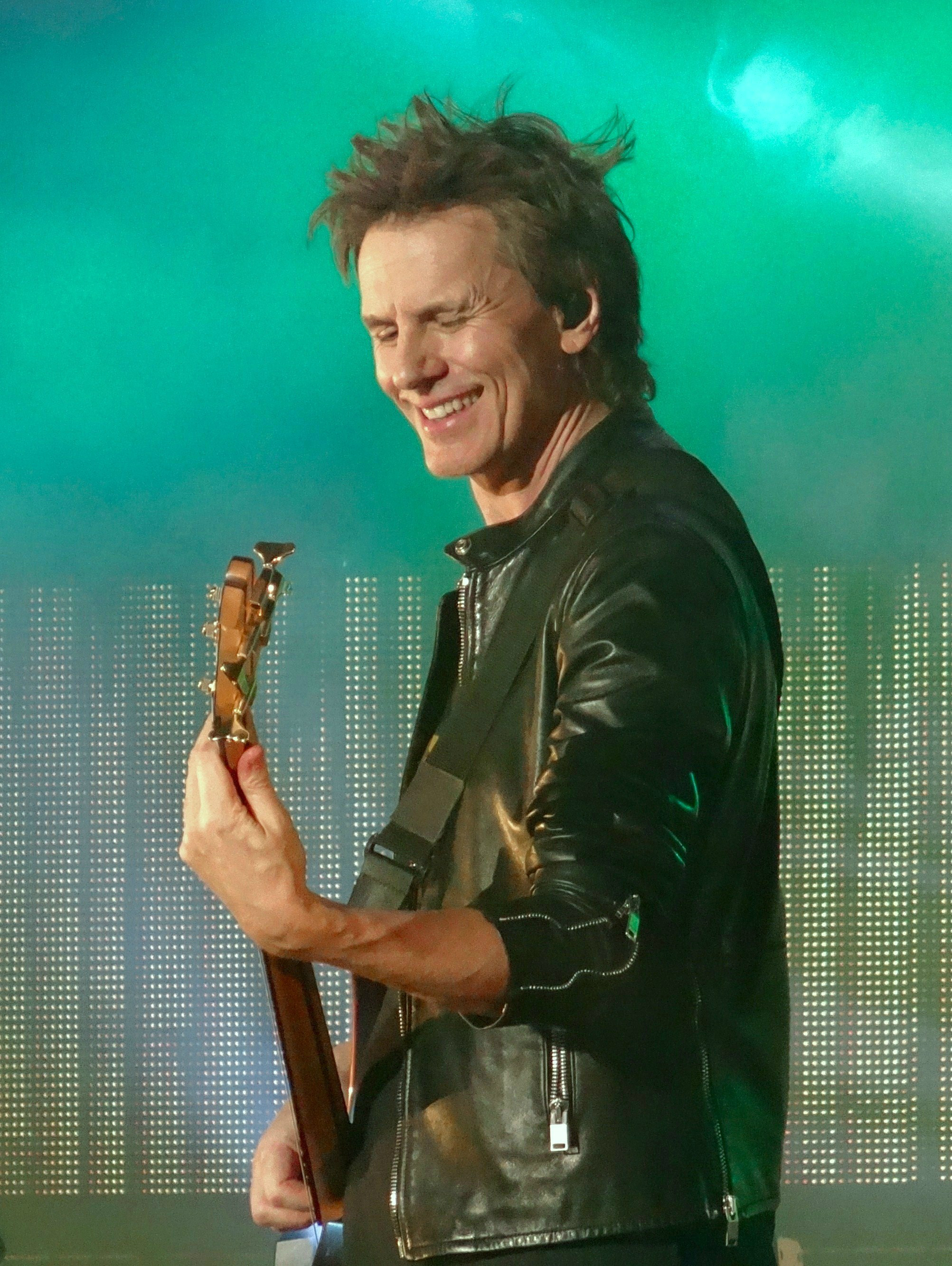 John Taylor, a bassist for Duran Duran. A gig in Bournemouth, England.